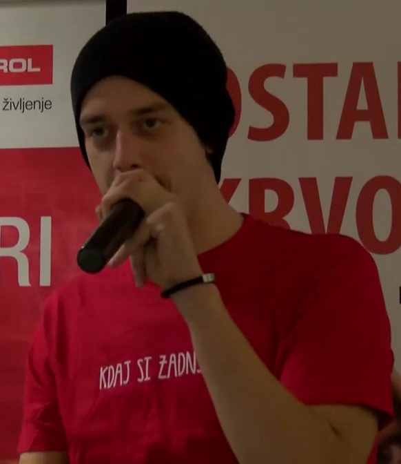 Rok Terkaj